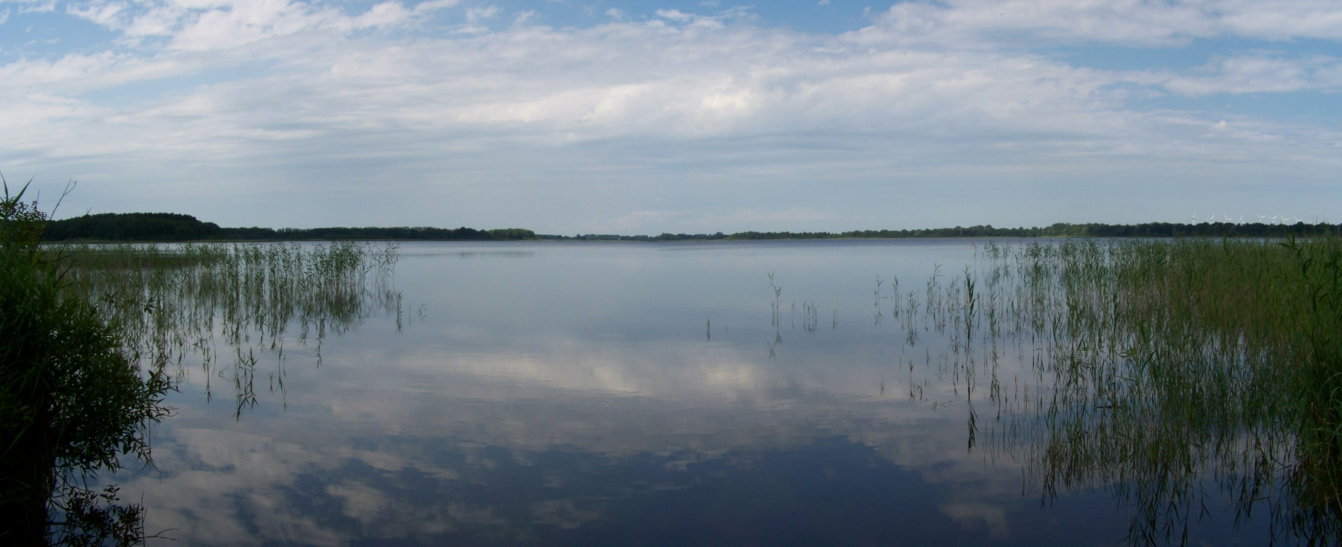 Borgwallsee in Vorpommern, Panorama (2009-07-14)